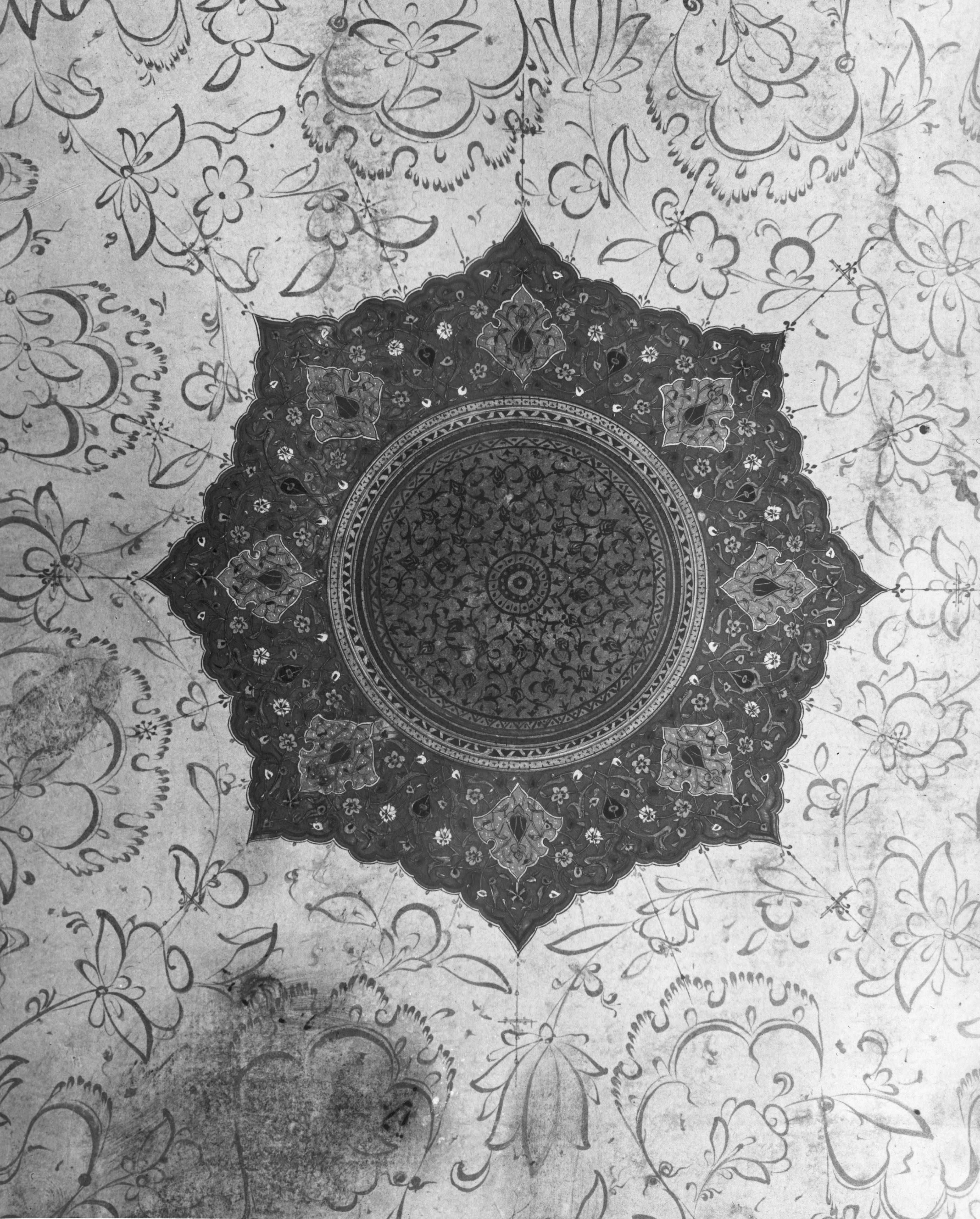 Illustrated manuscript; Codices